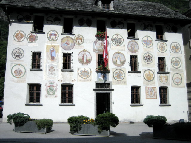 Das Gemeindehaus in Cevio